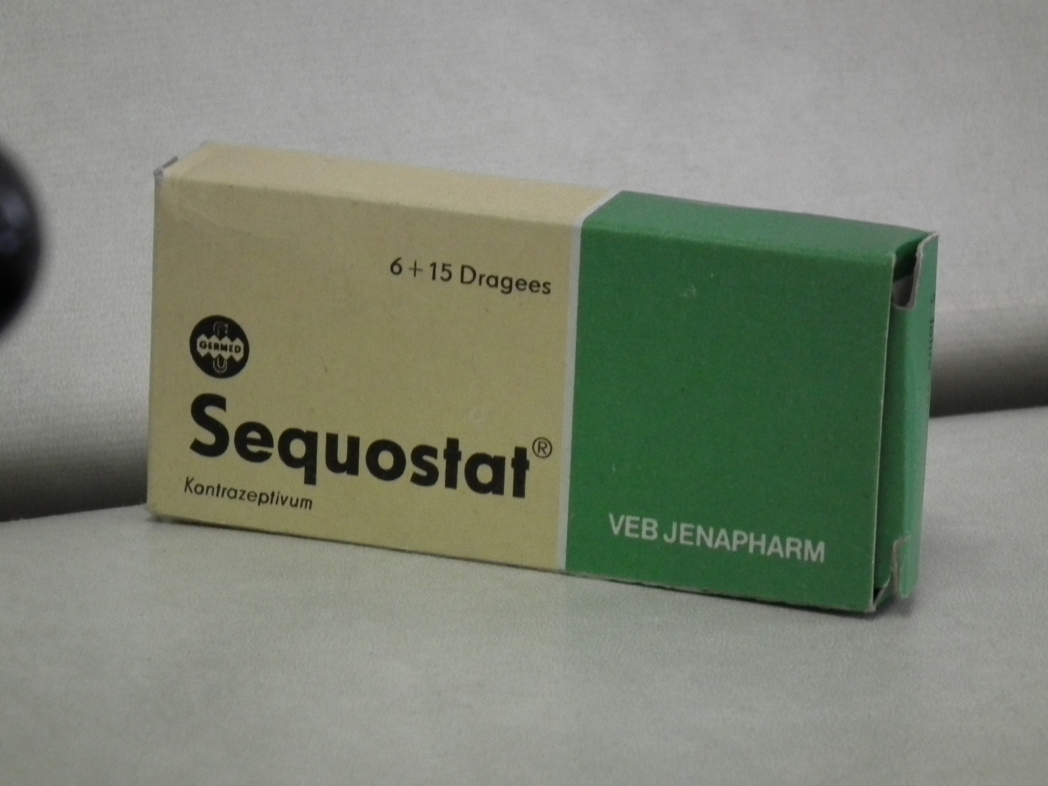 DDR Museum Zeitreise Radebeul, Sequostat VEB Jenapharm, Fotografiert mit Genehmigung der Museumsleitung